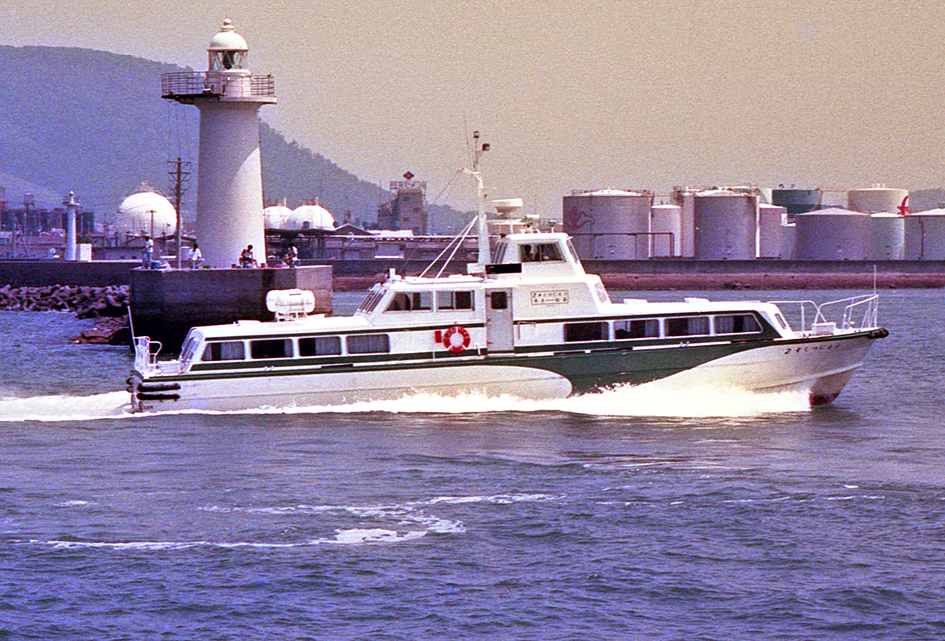 関西急行フェリー 高松－土庄航路高速艇 ふえにつくす2